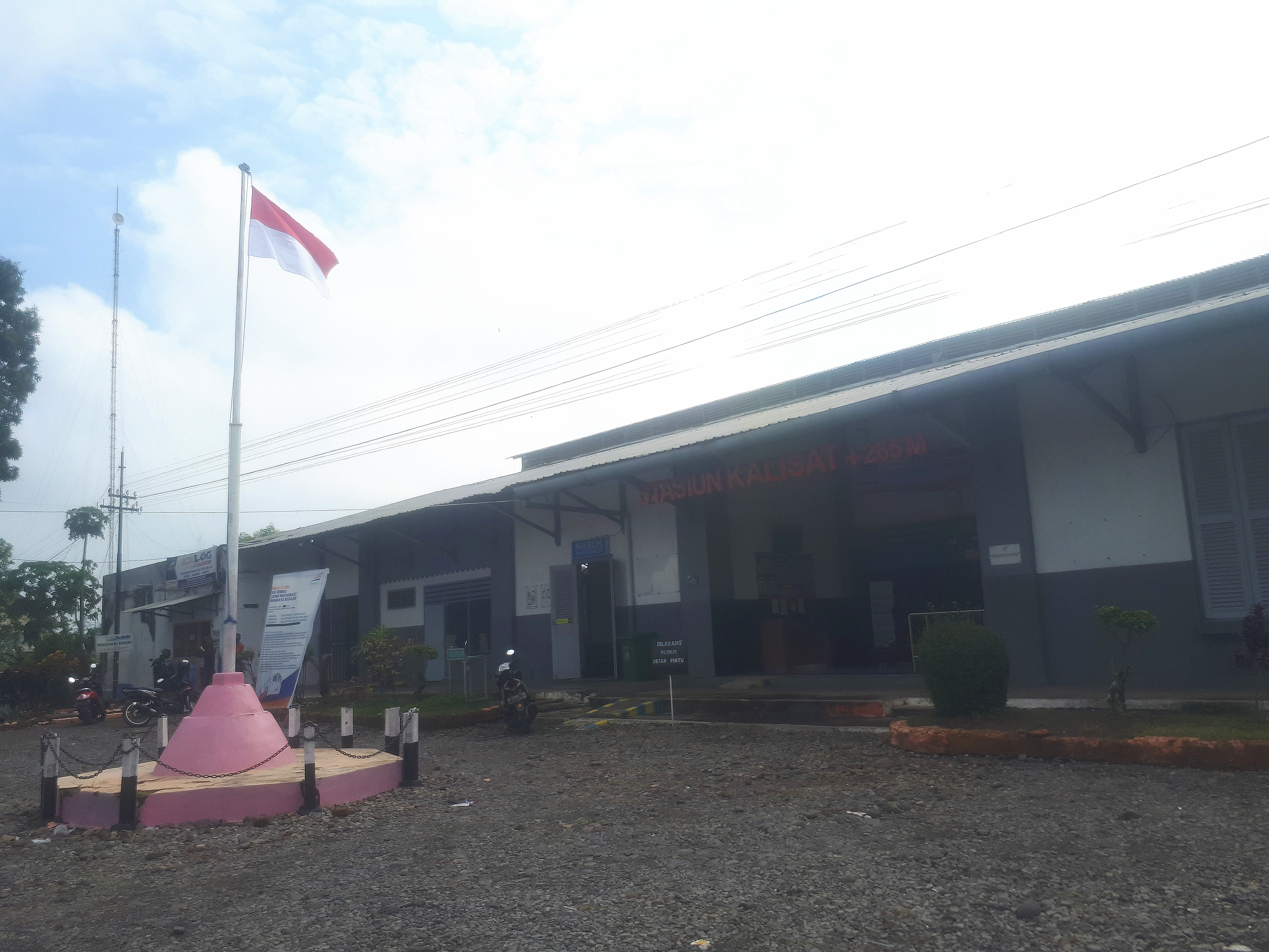 Tampak depan Stasiun Kalisat, 2020